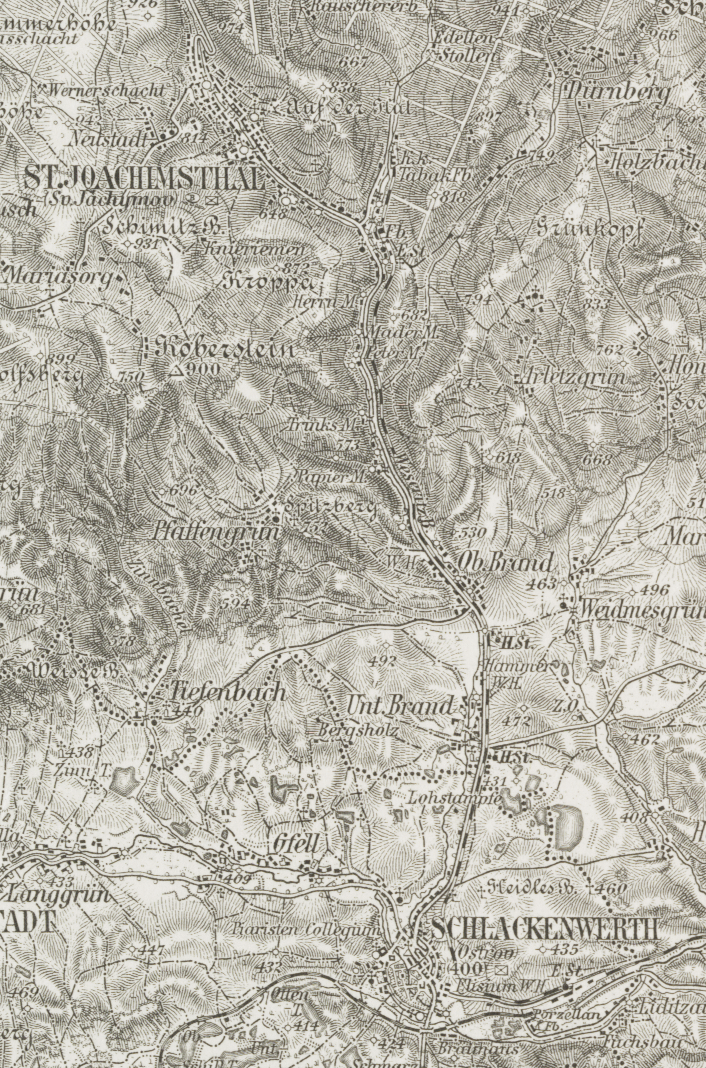 Ausschnitt aus: Kaaden und St. Joachimsthal.; Spezialkarte der osterreichisch-ungarischen Monarchie. Mit dem Streckenverlauf der Lokalbahn Schlackenwerth–Joachimsthal.